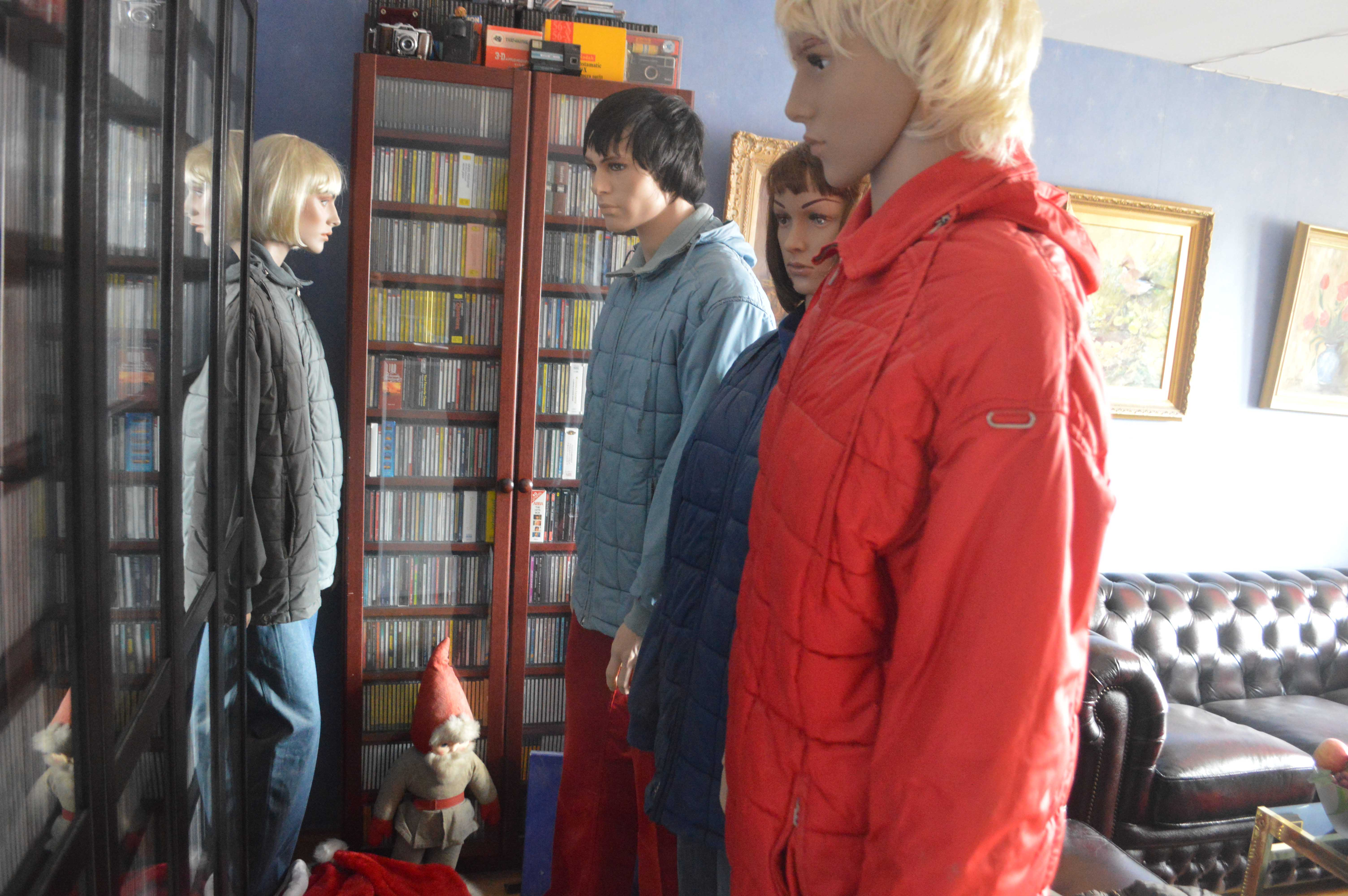 BOGNER